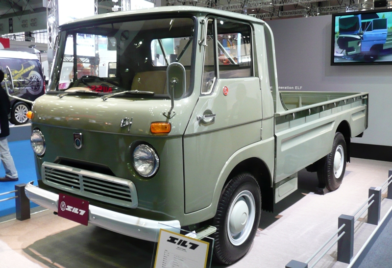 Isuzu Elf.